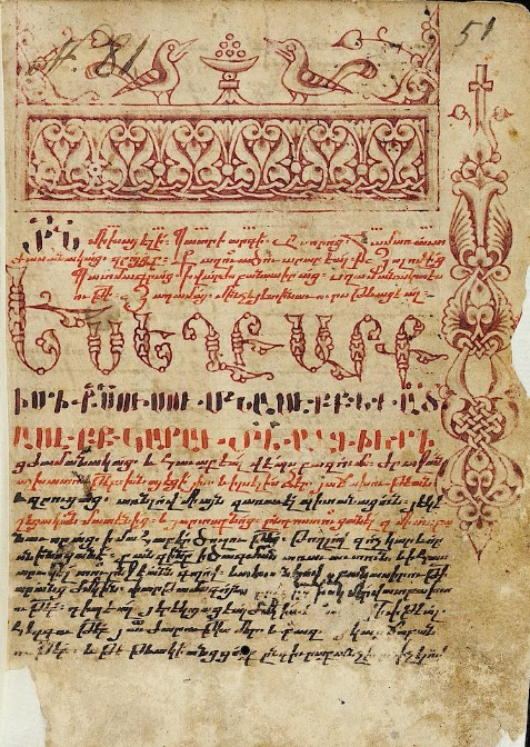 Միքայէլ Ասորի, Պատմութիւն